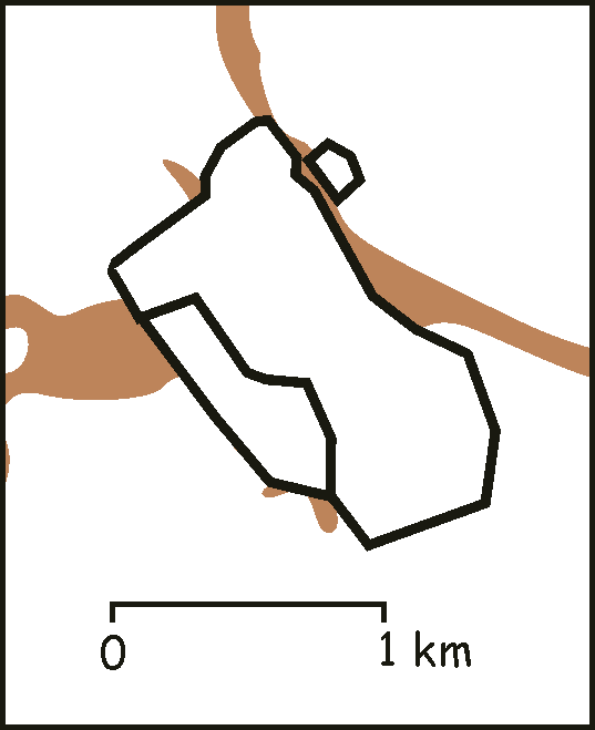 Utilisateur:Laurent Deschodt Summary position approximative de l'enceinte médiévale de Lille et de ses extensions Catégorie:Cartes et plans de Lille